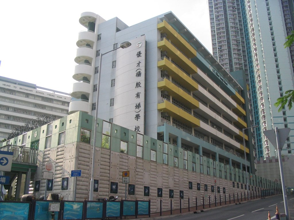 優才(楊殷有娣)學校 G.T. (Ellen Yeung) College